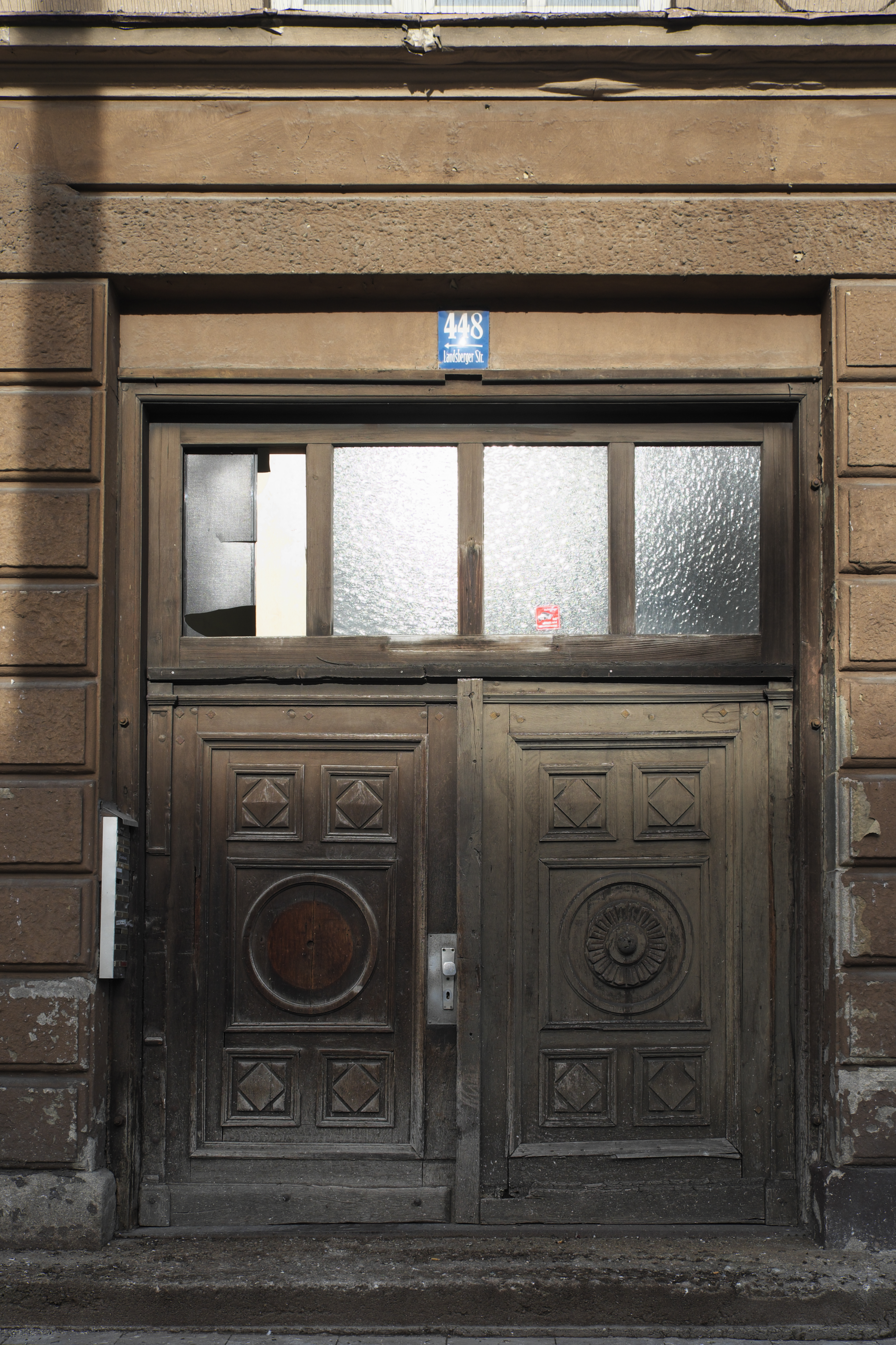 Mietshaus in der Landsberger Straße 448 in Pasing im Stadtbezirk Pasing-Obermenzing in München (Bayern/Deutschland)